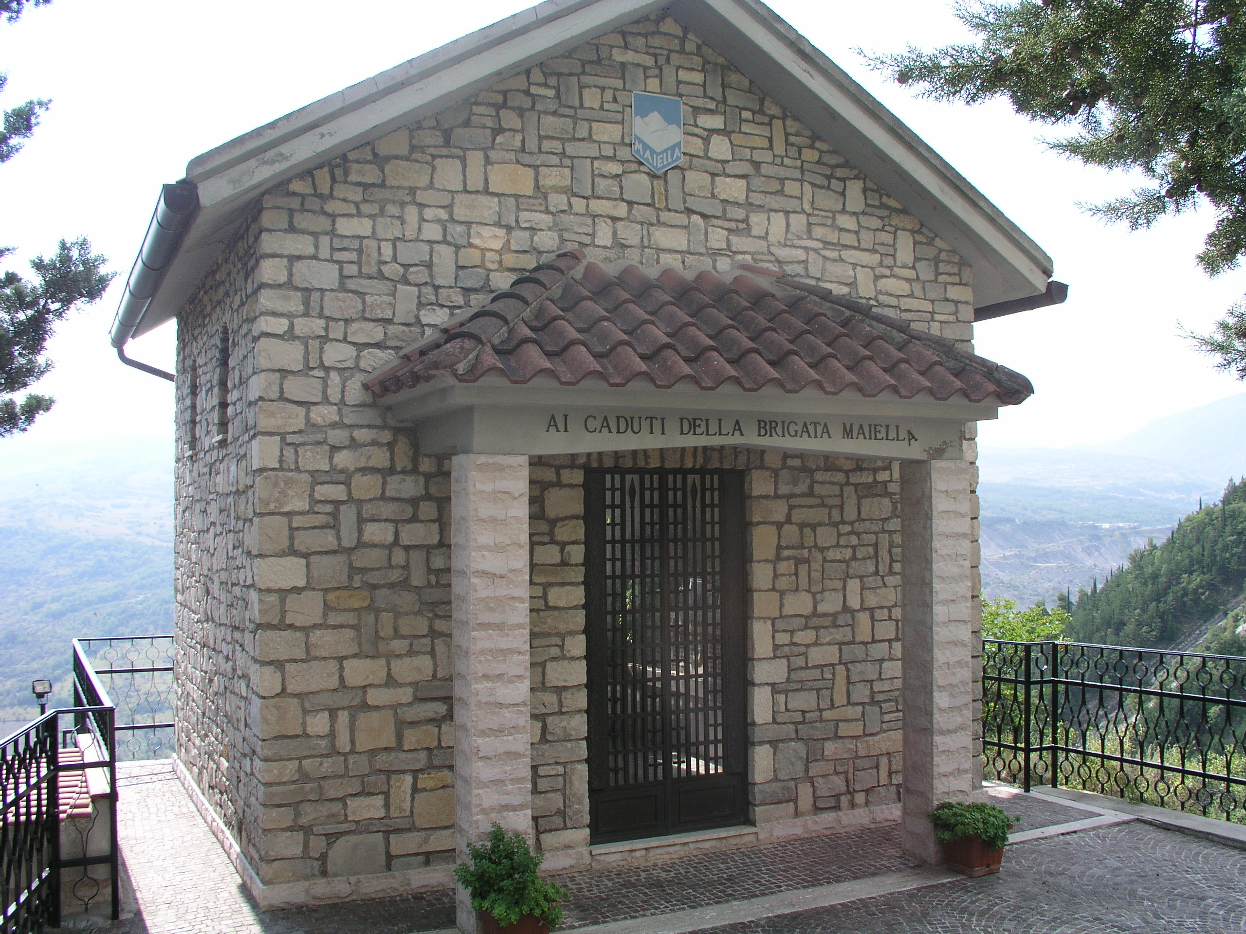 Autore: Rocco De Marco - rocco(a) Foto scattata in proprio e liberamente utilizzabile citando l'autore